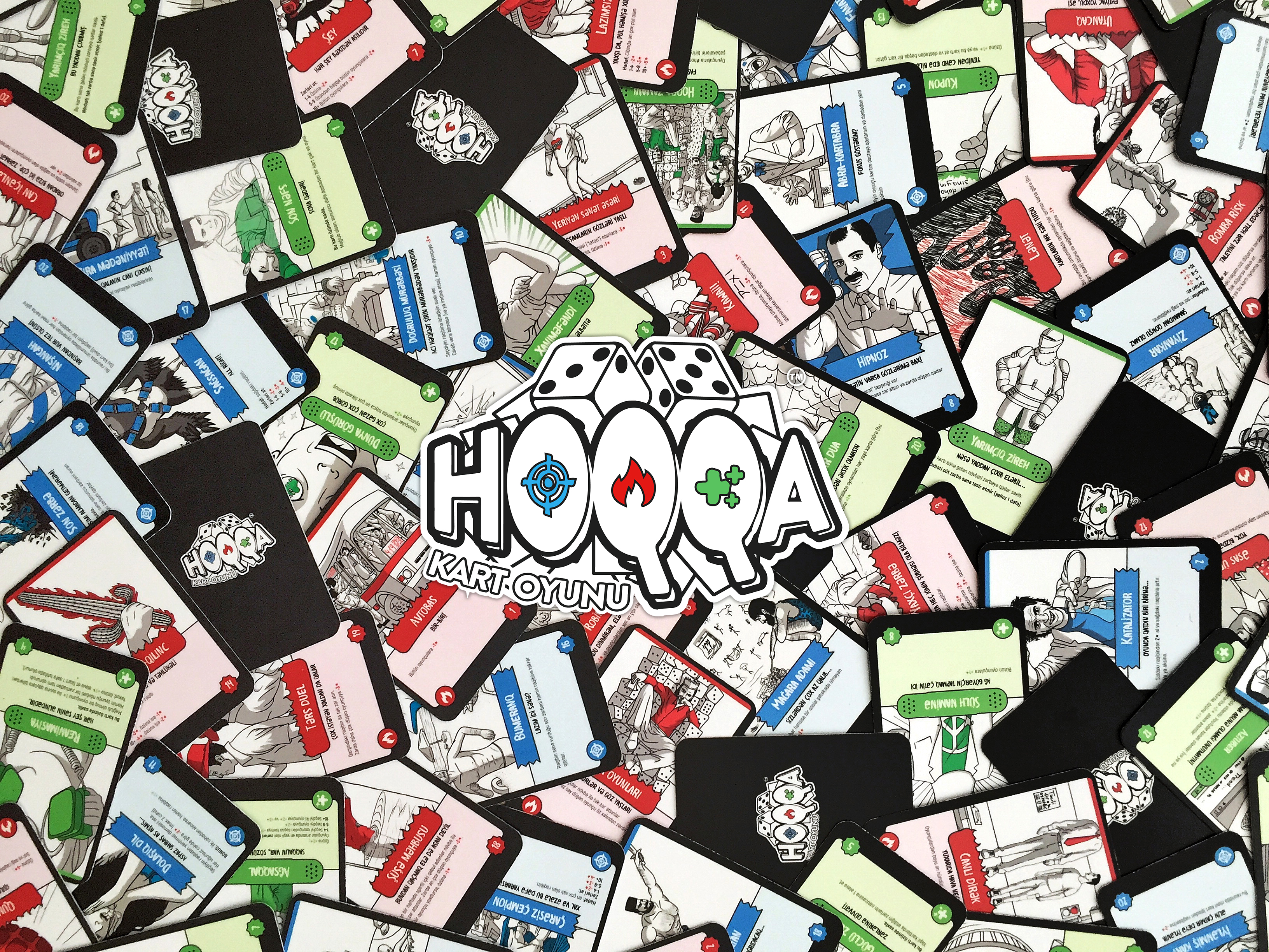 Hoqqa Kart Oyunu Wallpaper